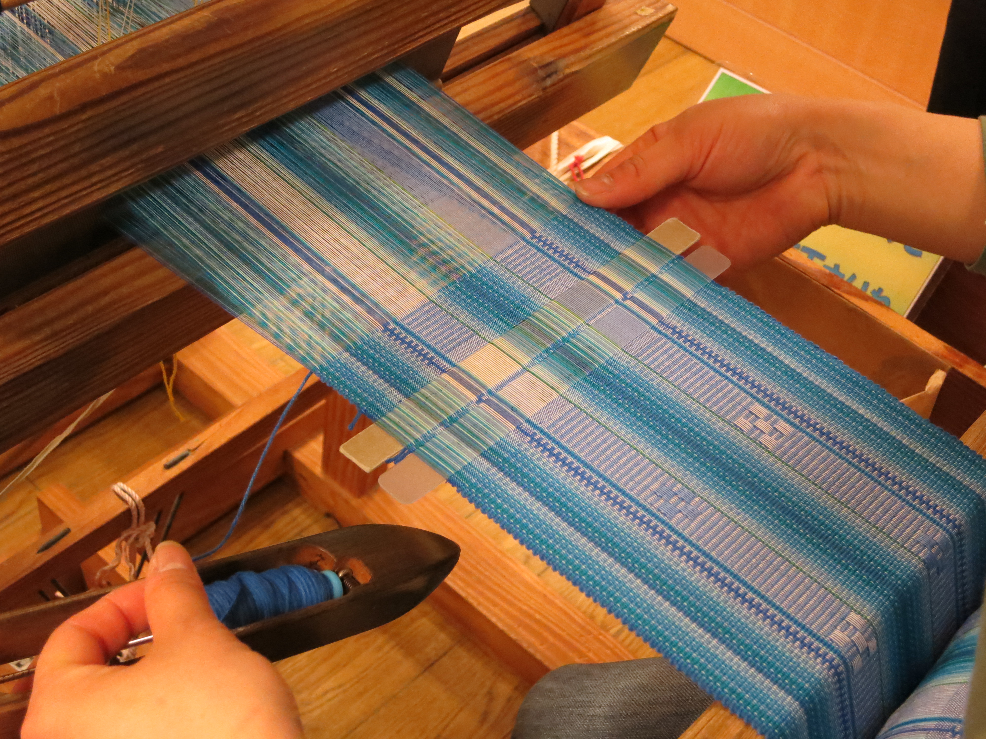 石垣島。ミンサー織り。Ishigaki island, minsa.